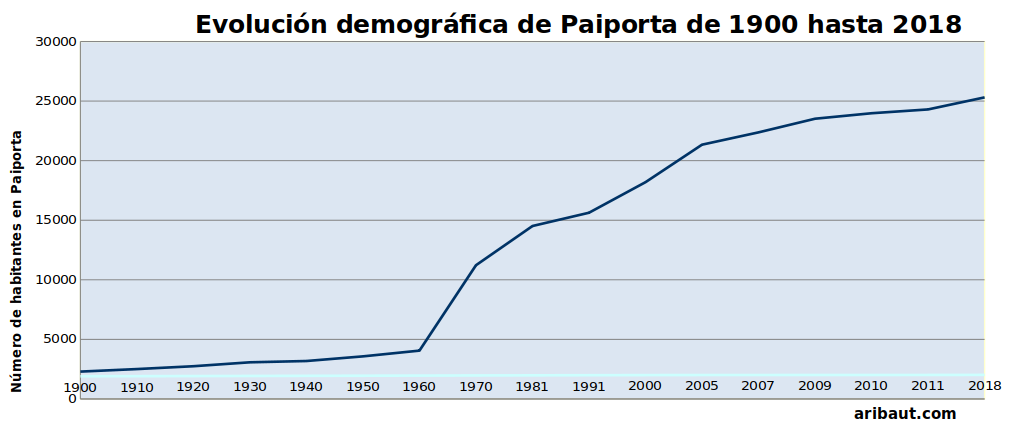 Evolución grafica de la demografía en Paiporta de 1900 hasta 2018